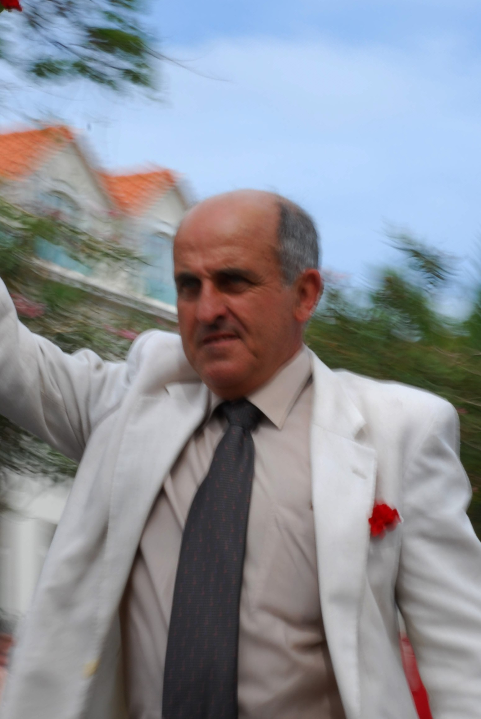 El diputado del PND, José Manuel Coelho en el desfile de la Fiesta de la Flor.